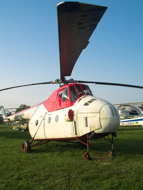 Mi-4 at an aviation museum in Kiev, Ukraine